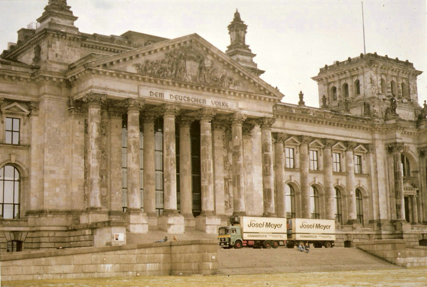 LKW-Reklame auf der Treppe vom Reichstag 1981